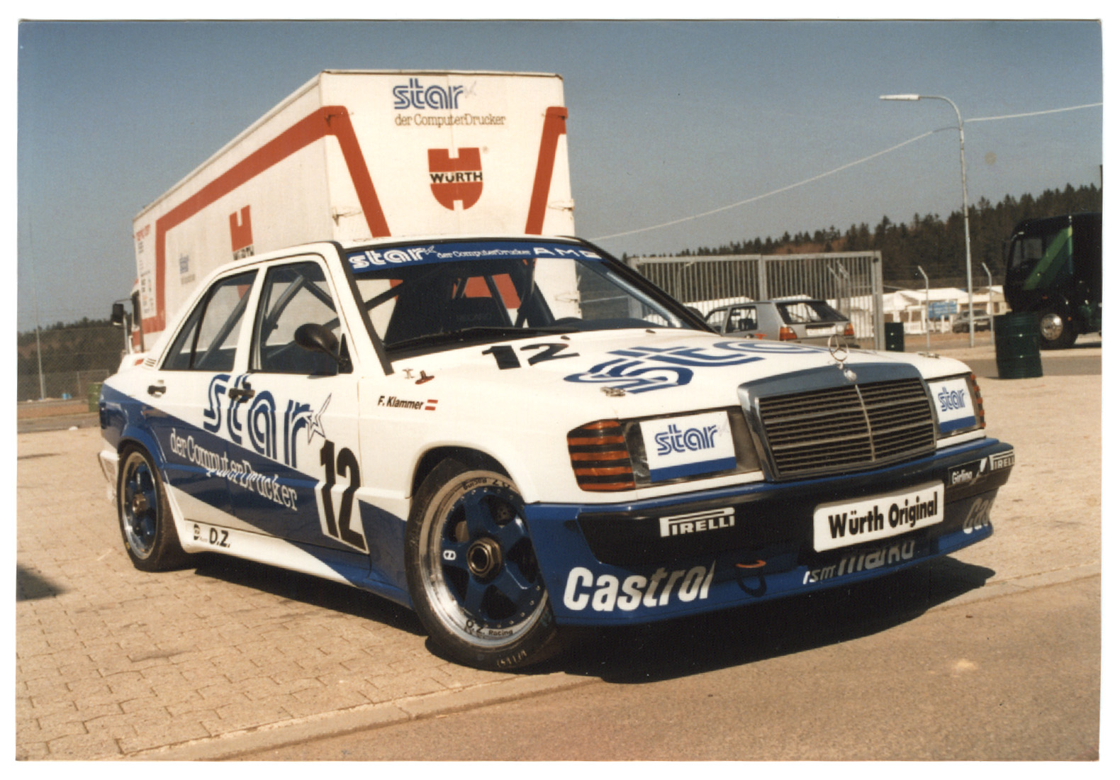 Der DTM-Rennwagen von Franz Klammer/Team RSM Marko im Fahrerlager des Nürburgrings, April 1987.